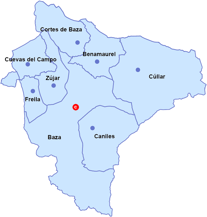 Mapa de la Comarca de Baza, en la provincia de Granada (España).